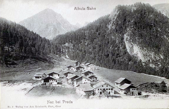 Ansichtskarte des Weltpostvereins von Naz GR mit Poststempel vom 8. November 1902